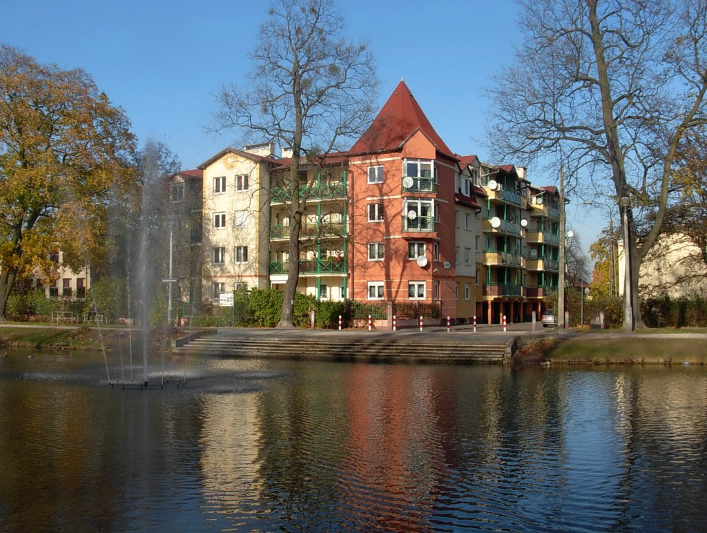 W parku nad Kanałem Bydgoskim